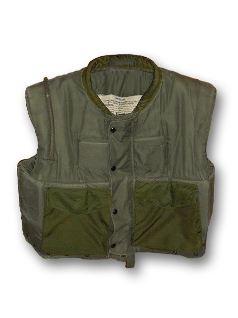 amerikanische "Flack Jacket" M55 aus dem Vietnamkrieg (US-Marines)